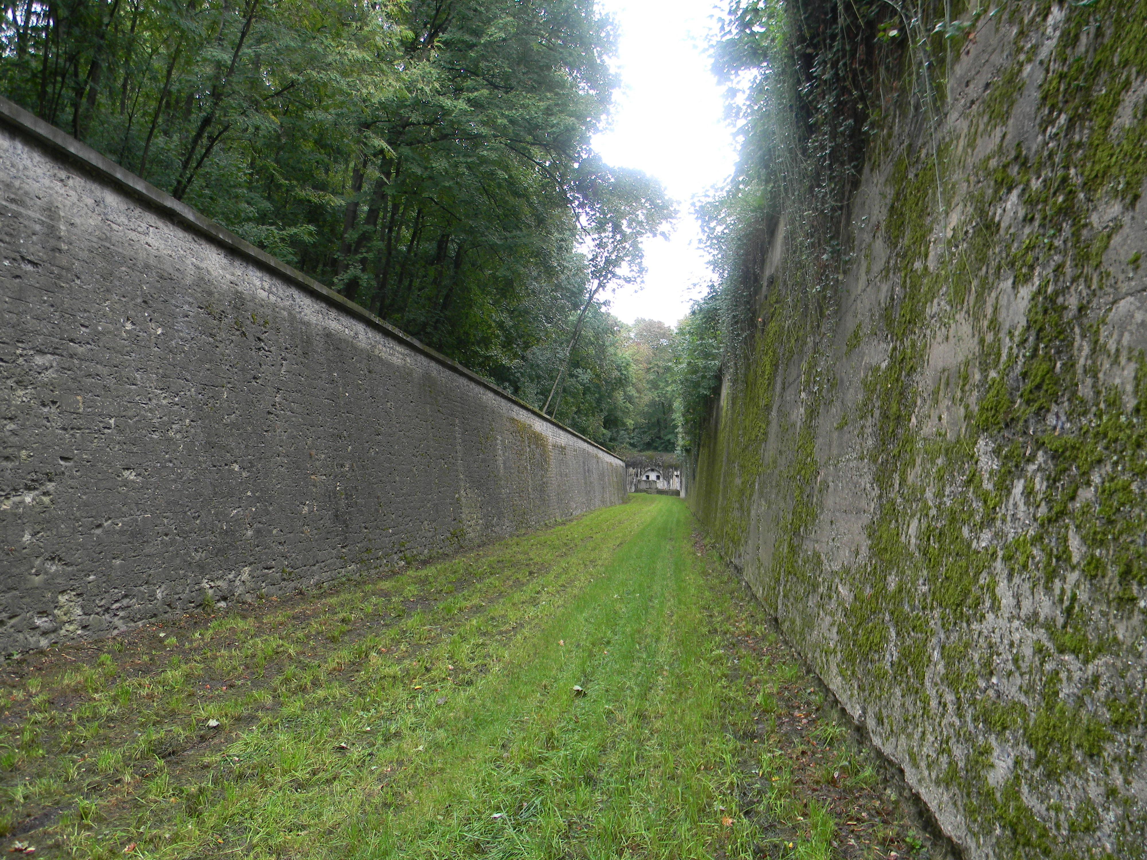 Fossé du flanc droit du Fort de Saint-Priest. Au bout, le coffre de contre-escarpe qui assure la défense du fossé. Le fossé fait 10m de largeur sur 8m en hauteur, pour une longueur totale de 770m autour du fort.